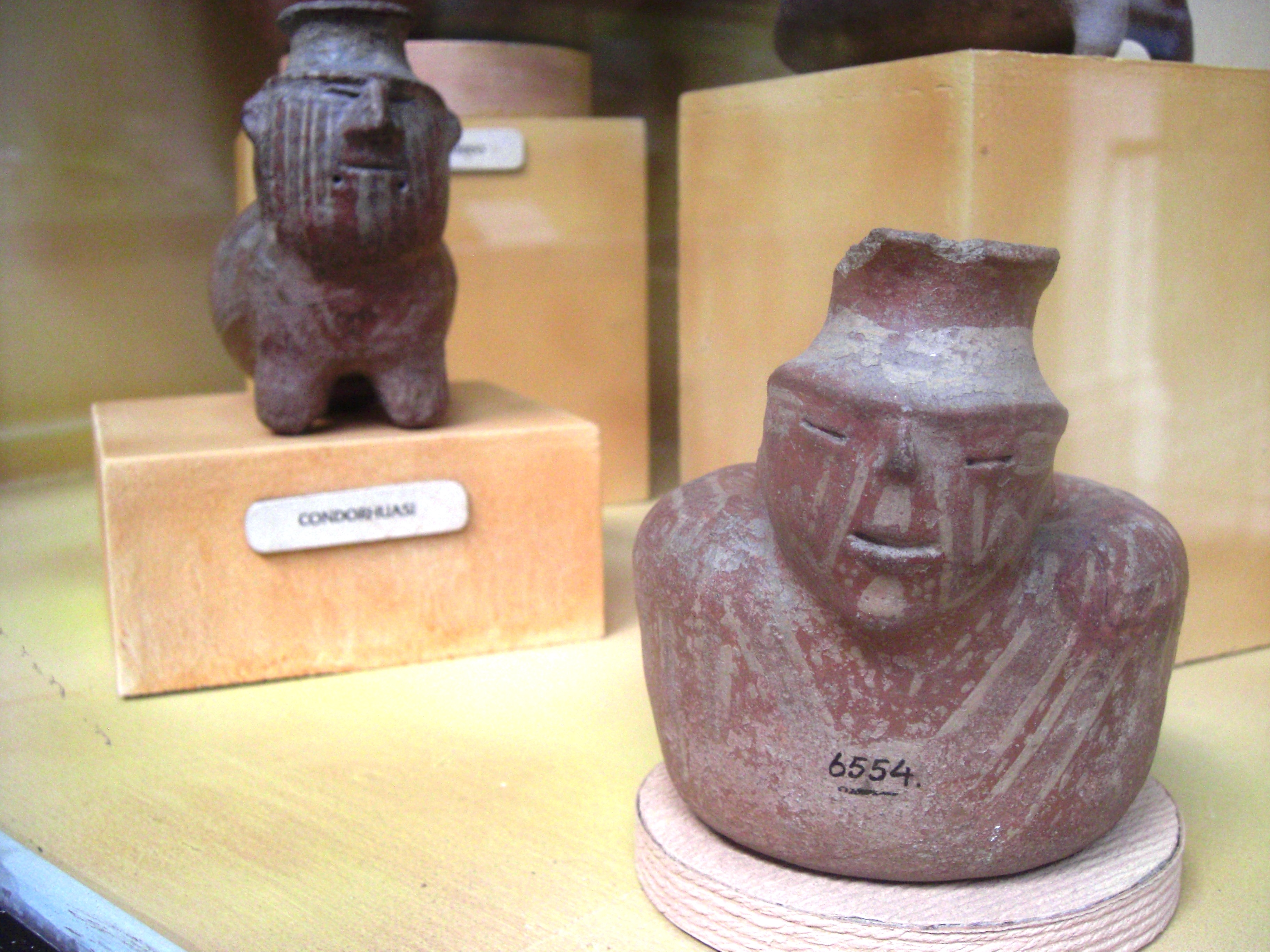 Detalle de la vitrina dedicada a Condorhuasi . Museo de la Plata. Argentina